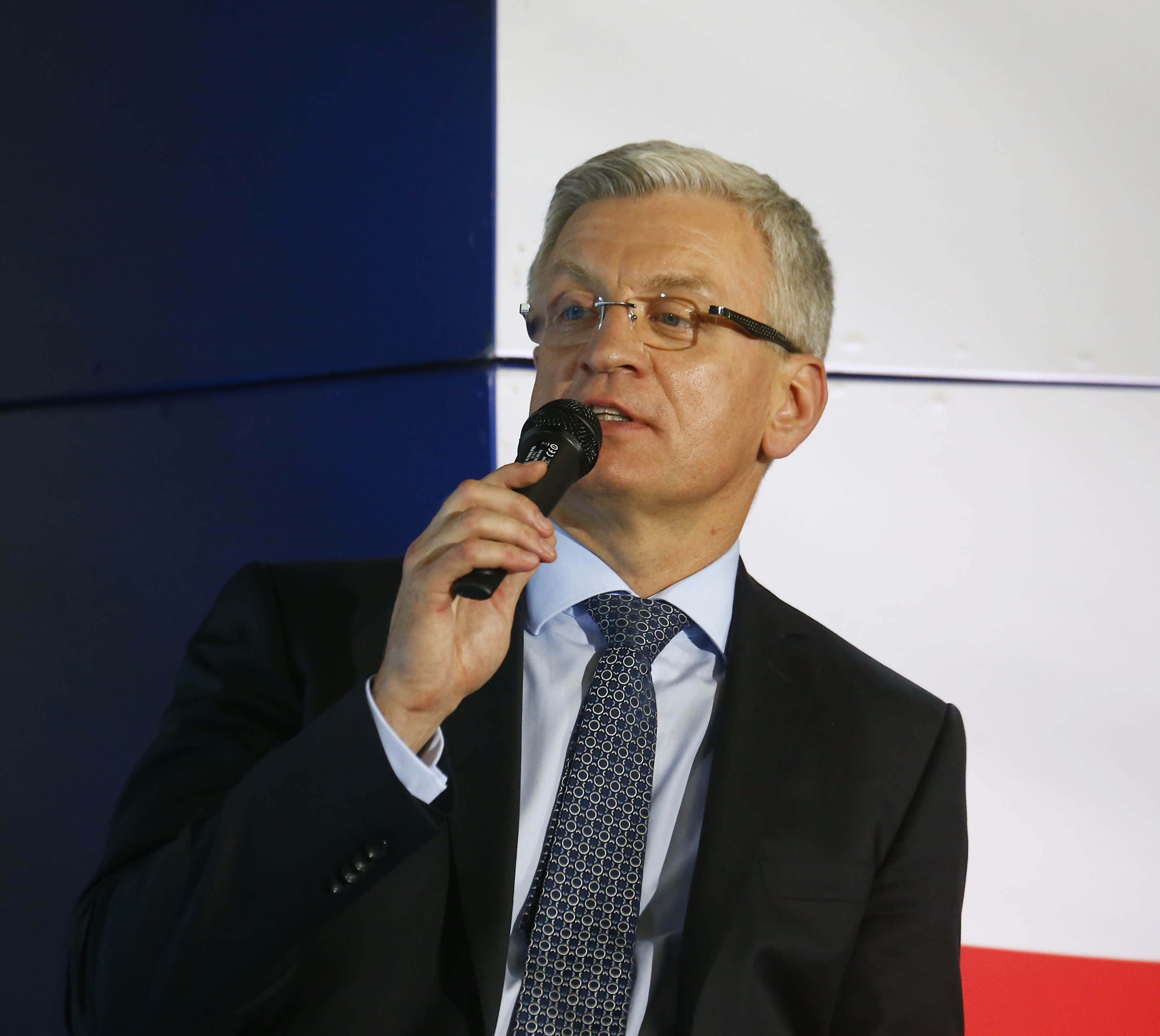 Jacek Jaśkowiak, prezydent Poznania.